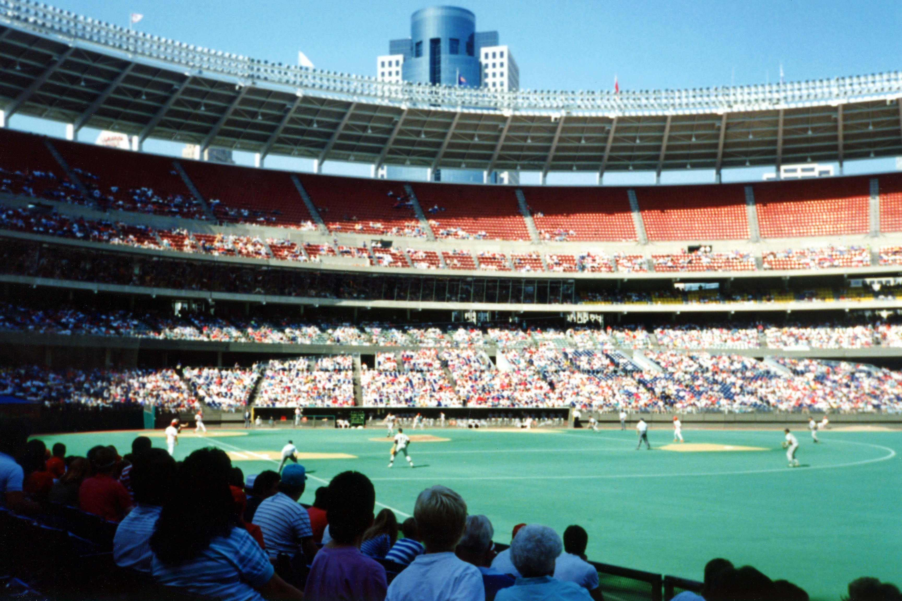 00:02, 2 April 2004 . . Rdikeman . . 640×433 (70,800 bytes)